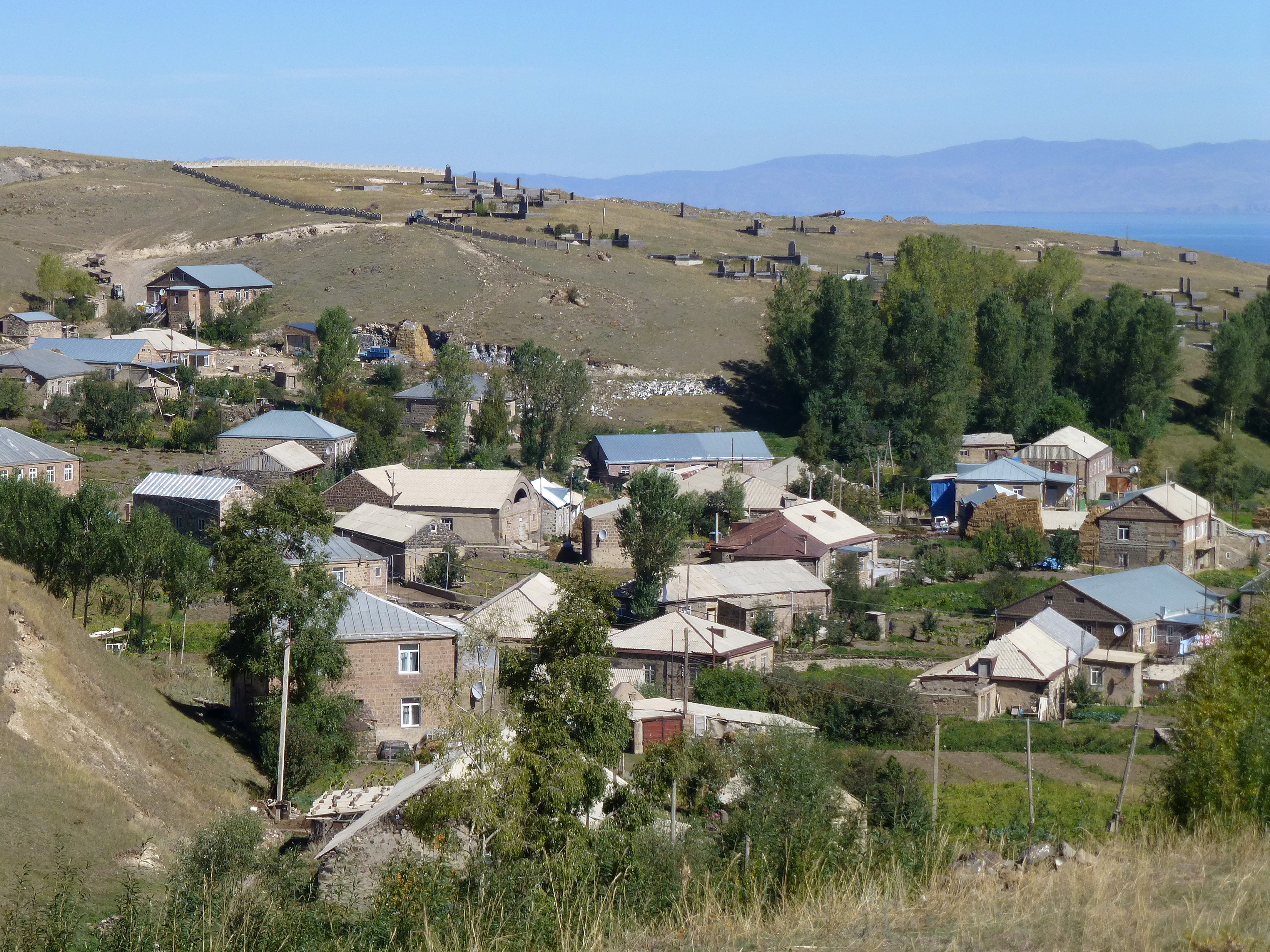 Cimetière de Madina, dans la province de Gegharkunik (Arménie). A droite, le lac Sevan.